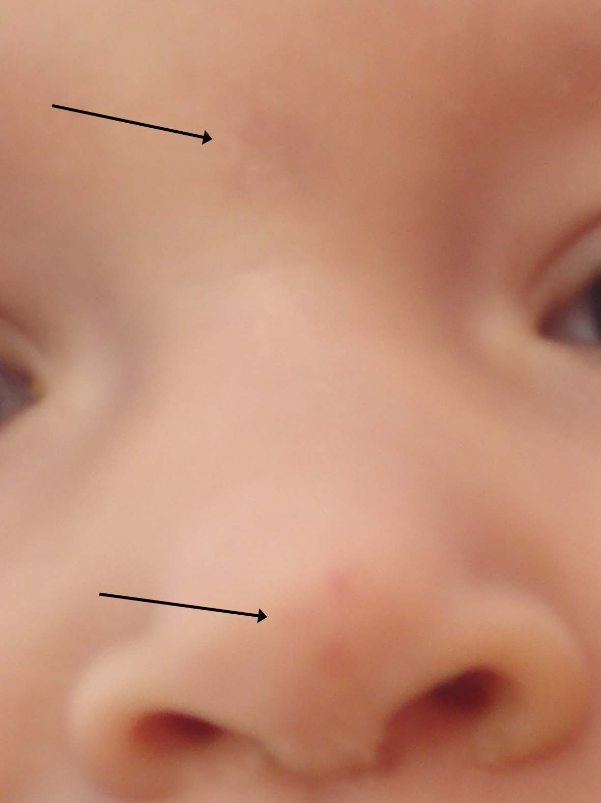 Naevus simplex sur le nez et entre les yeux